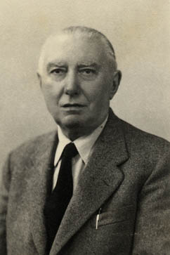 Giuseppe Lipparini, né le 2 septembre 1877 à Bologne et mort dans la même ville en 1951, est un critique littéraire, poète et écrivain italien.